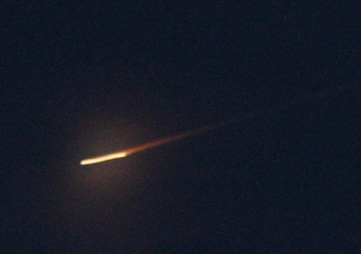 Полет ракеты-носителя «Протон» над Бийском